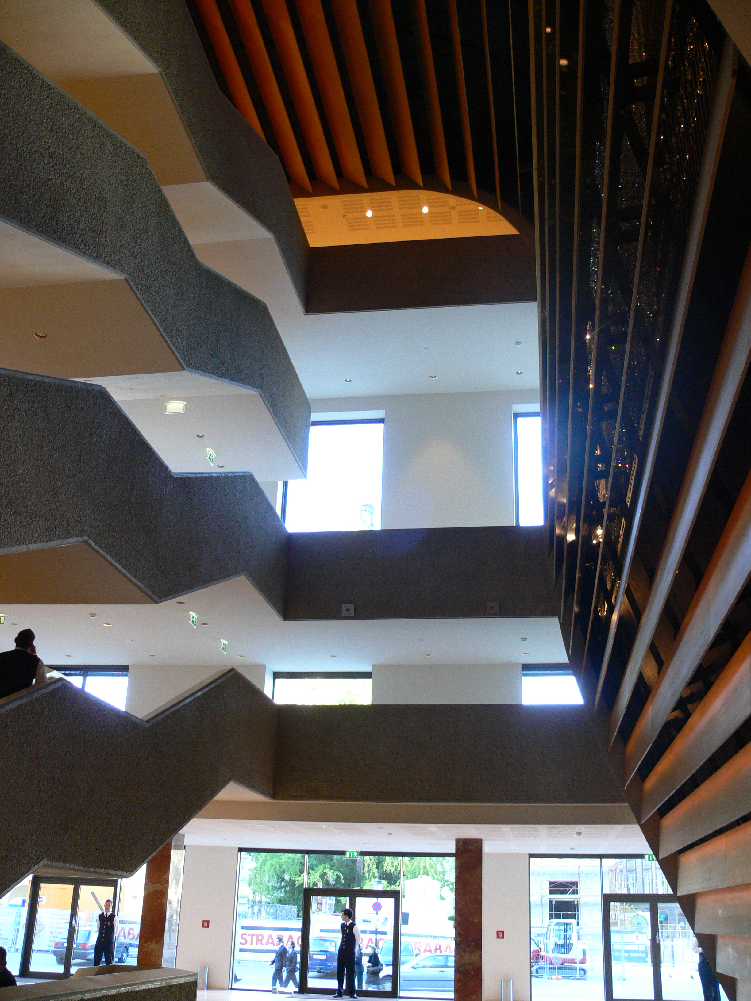 Salzburg, Festspielhauskomplex, Haus für Mozart (Kleines Festspielhaus) Treppenhaus